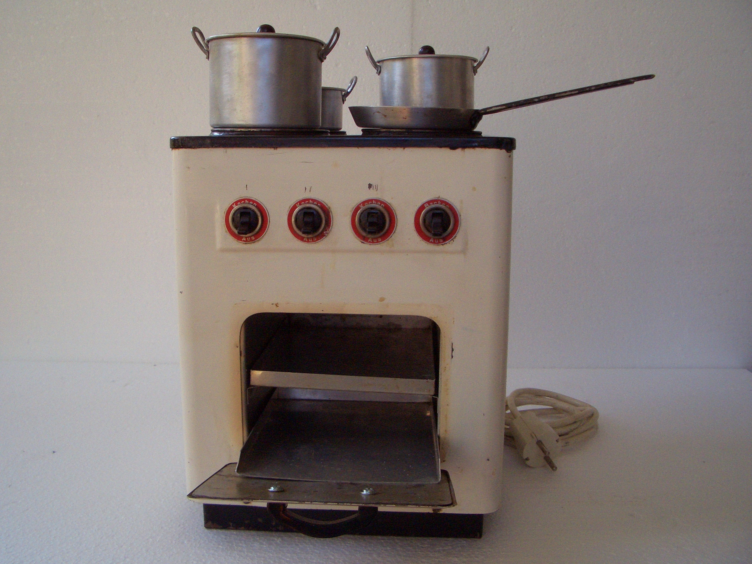 elektrischer Puppenherd, Anfang 1960er, Westdeutschland; doll's stove, early 1960s, Western Germany